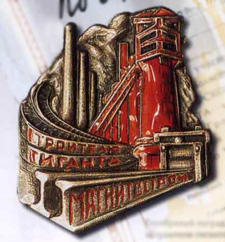 Знак «Строителю гиганта. Магнитострой». СССР, Ленинград, 1931 г. Мастерская «Ленэмальер». Бронза, серебрение, эмаль, 9,78 г. Размеры 36,5x31,9 мм. Право ношения знака присваивалось за активное участие в строительстве Магнитогорского металлургического комбината; одновременно ударник премировался Почетной грамотой." Было выпущено более 5000 бронзовых посеребренных значков. Награждались вольнонаёмные, сотрудники ОГПУ и заключенные.